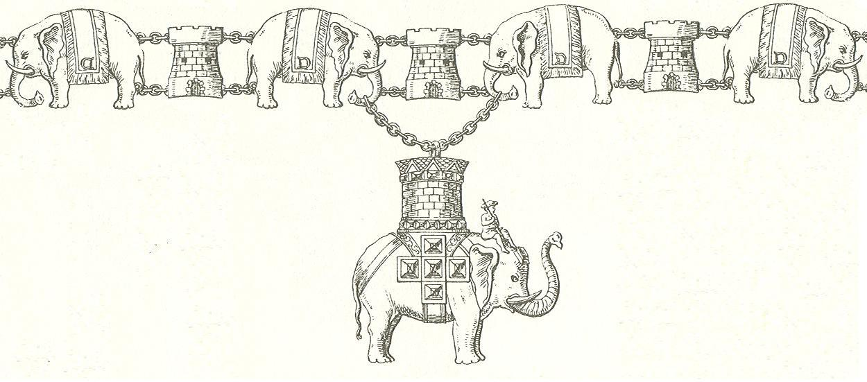 Eigen tekenwerk met behulp van de tekeningen van Gritzner uit 1893